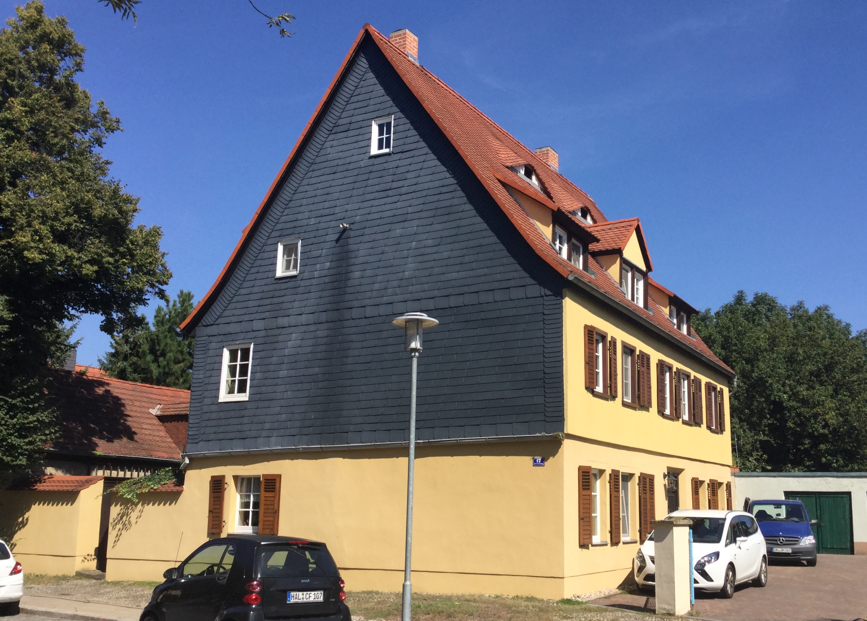 Haus Oberaltenburg 17